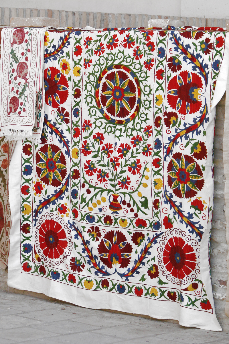 Le mot suzani, littéralement "travail d'aiguille" (suzan, "aiguille, épingle" en persan) désigne des tissus de différentes dimensions ornés de décor (extrait du site suivant) Photo Annie Dalbéra